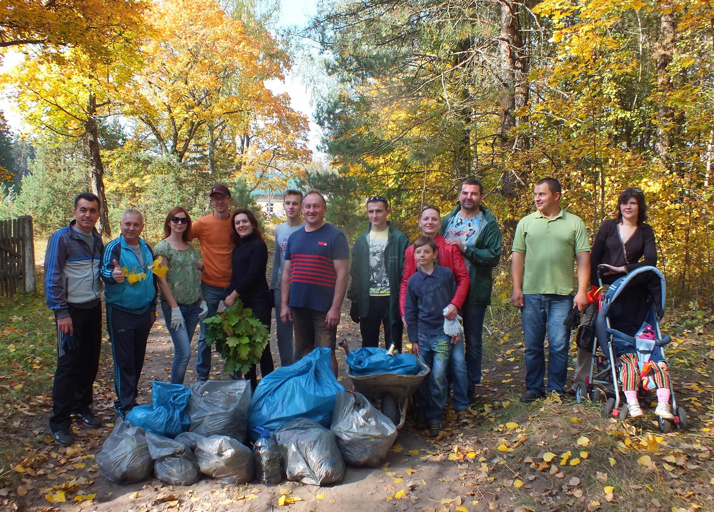 Вместе собрались по окончанию акции